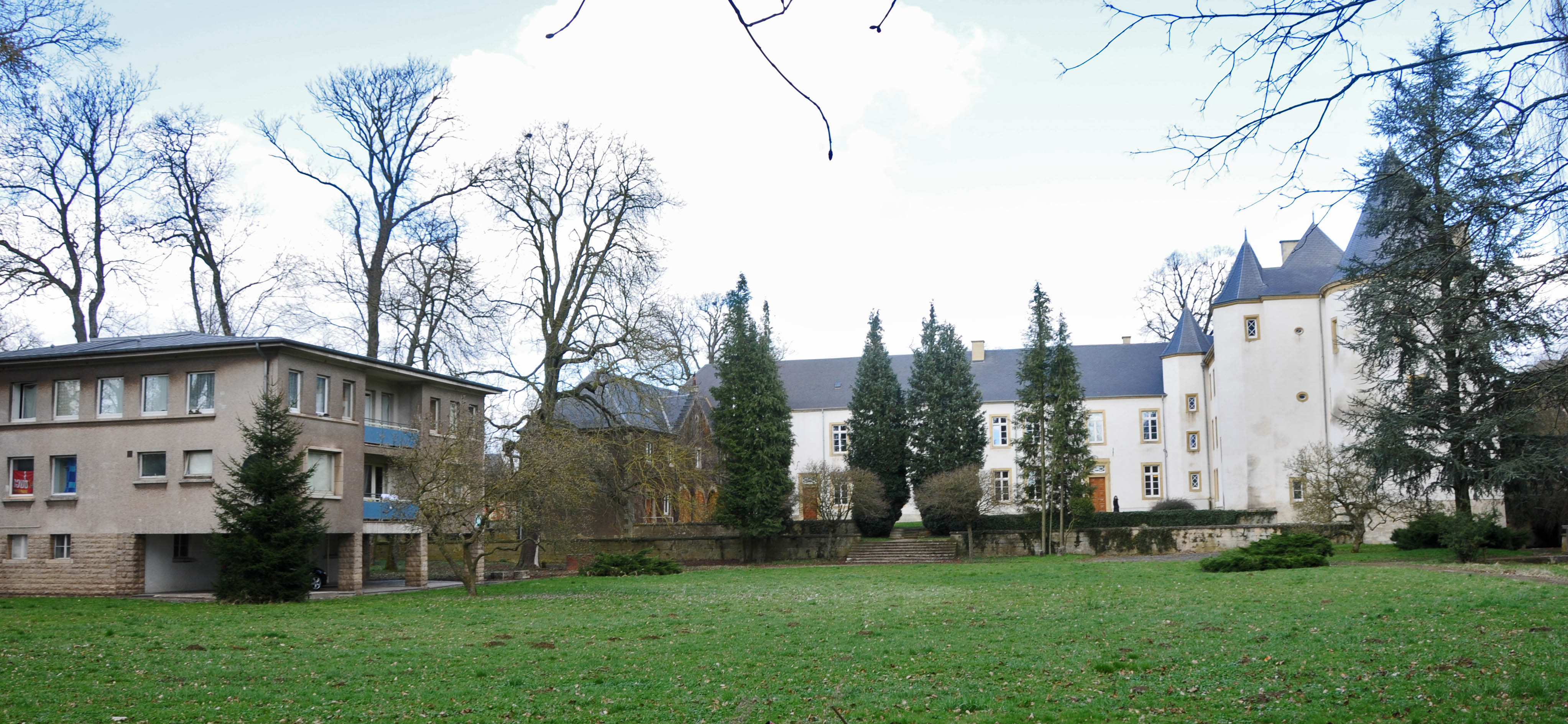 Le château de Sanem (Luxembourg)